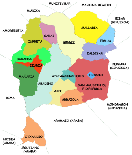 Mapa antiguos componentes de la Merindad de Durango, Vizcaya, País Vaco, España.